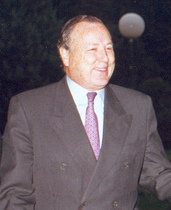 El alcalde de Madrid, José María Álvarez del Manzano, en la inauguración de Mundo Internet 2001.